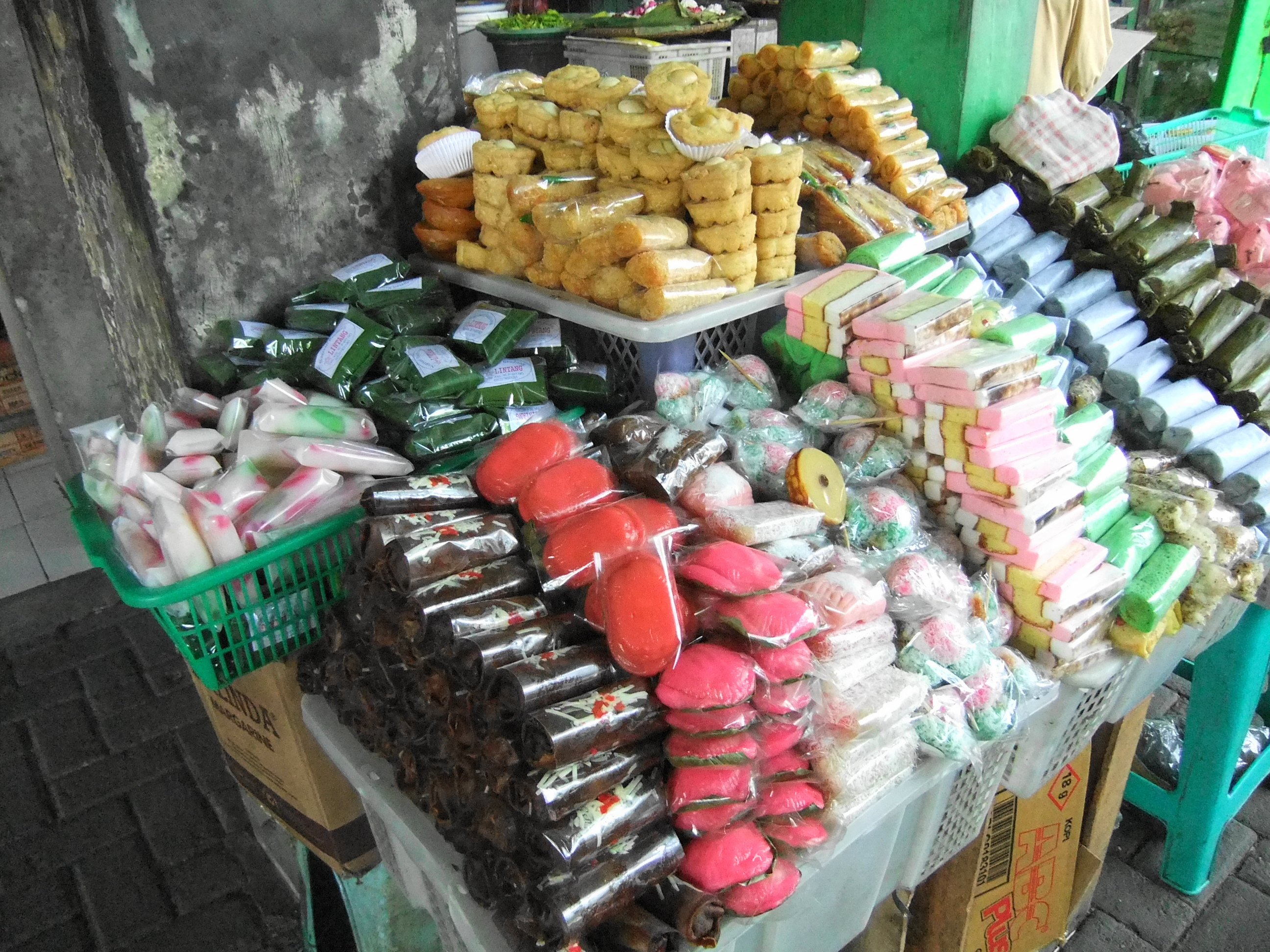 Kue-kue basah di Pasar Bulu Semarang